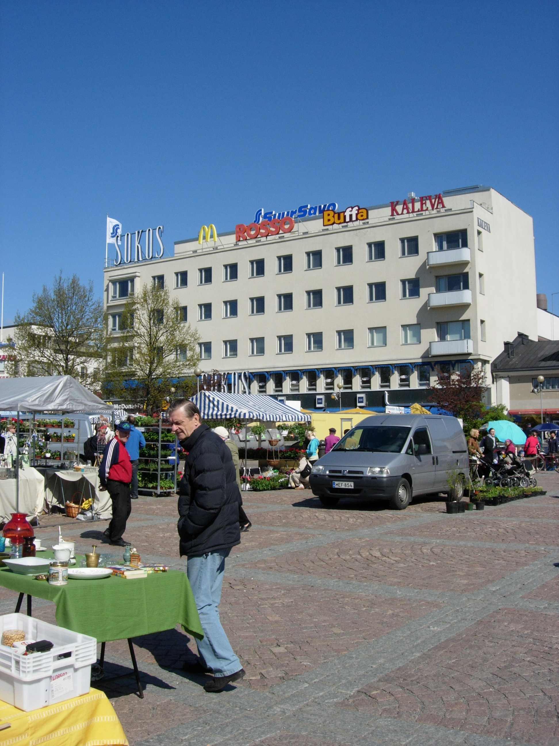 Mikkelin tori ja Sokos Hallituskadulla.